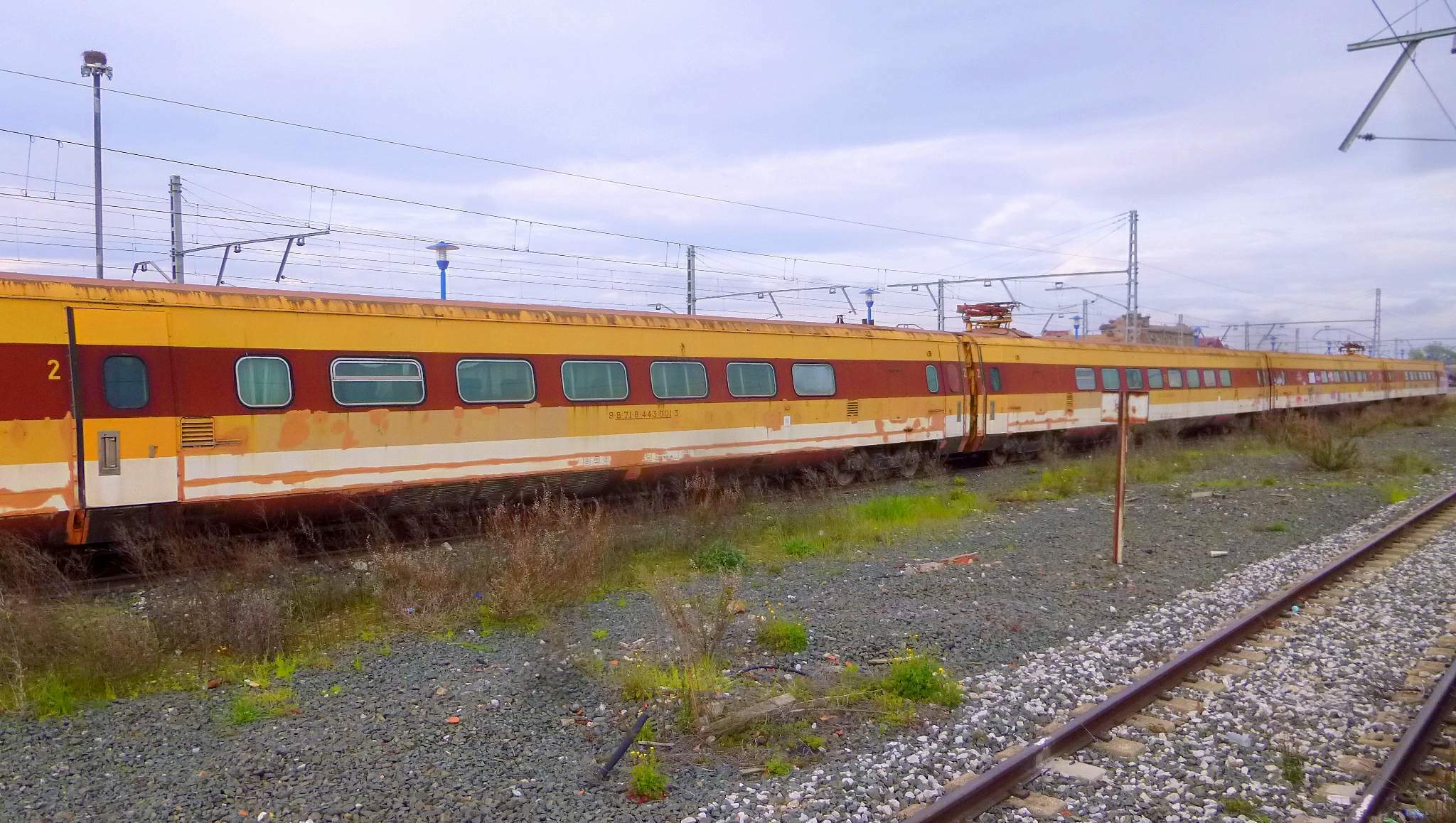 El entrañable 'Platanito' (el único tren de la Serie 443 de Renfe que estuvo en servicio en España, una suerte de AVE avant la lettre aunque incluso más suntuoso, comparativamente para su época), muy querido por todos los viajeros que suelen estacionar o hacer transbordo en Castejón (Navarra), pero abandonado a su triste suerte por la desidia, la incultura y la estrechez mental de las autoridades de turno.